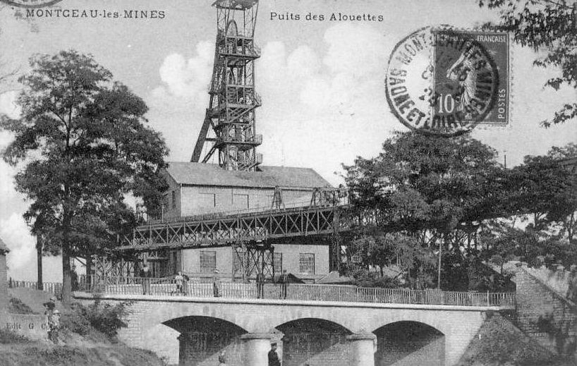 Le puits des Alouettes.